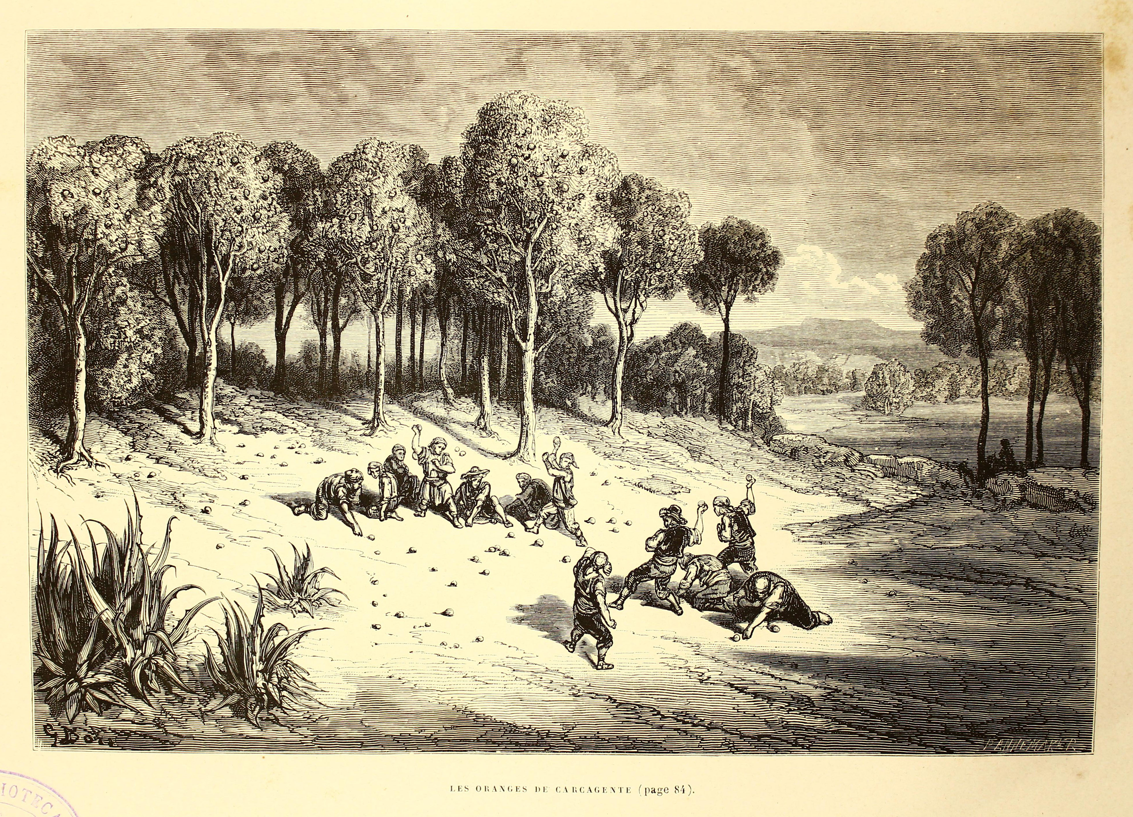 Autor: Davillier, Jean Charles, barón, 1823-1883 Descripción bibliográfica: L'Espagne / par Le Baron CH. Davillier ; ilustrée de 309 gravures dessinées su bois par Gustave Doré. - Paris : Librairie Hachette, 1874. - 799 p. : il. Materia: España- Geografía Materia: España- Usos y costumbres Ilustrador: Doré, Gustave, 1832-1883 Editor: Libreria Hachette Lugar de impresión: Francia, París Localización: Libro completo